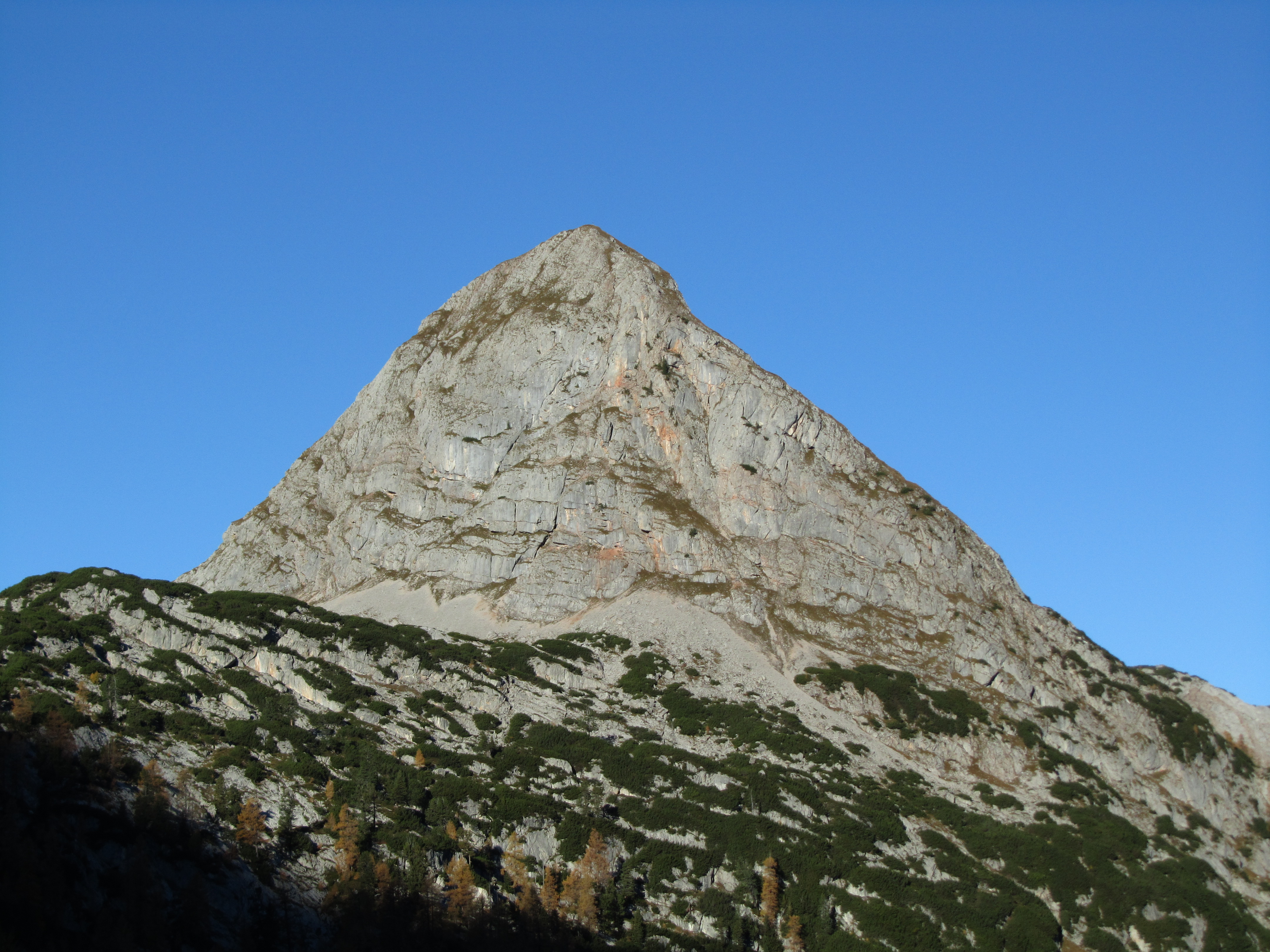 Der Viehkogel (2158 m) im Steinernen Meer von Osten